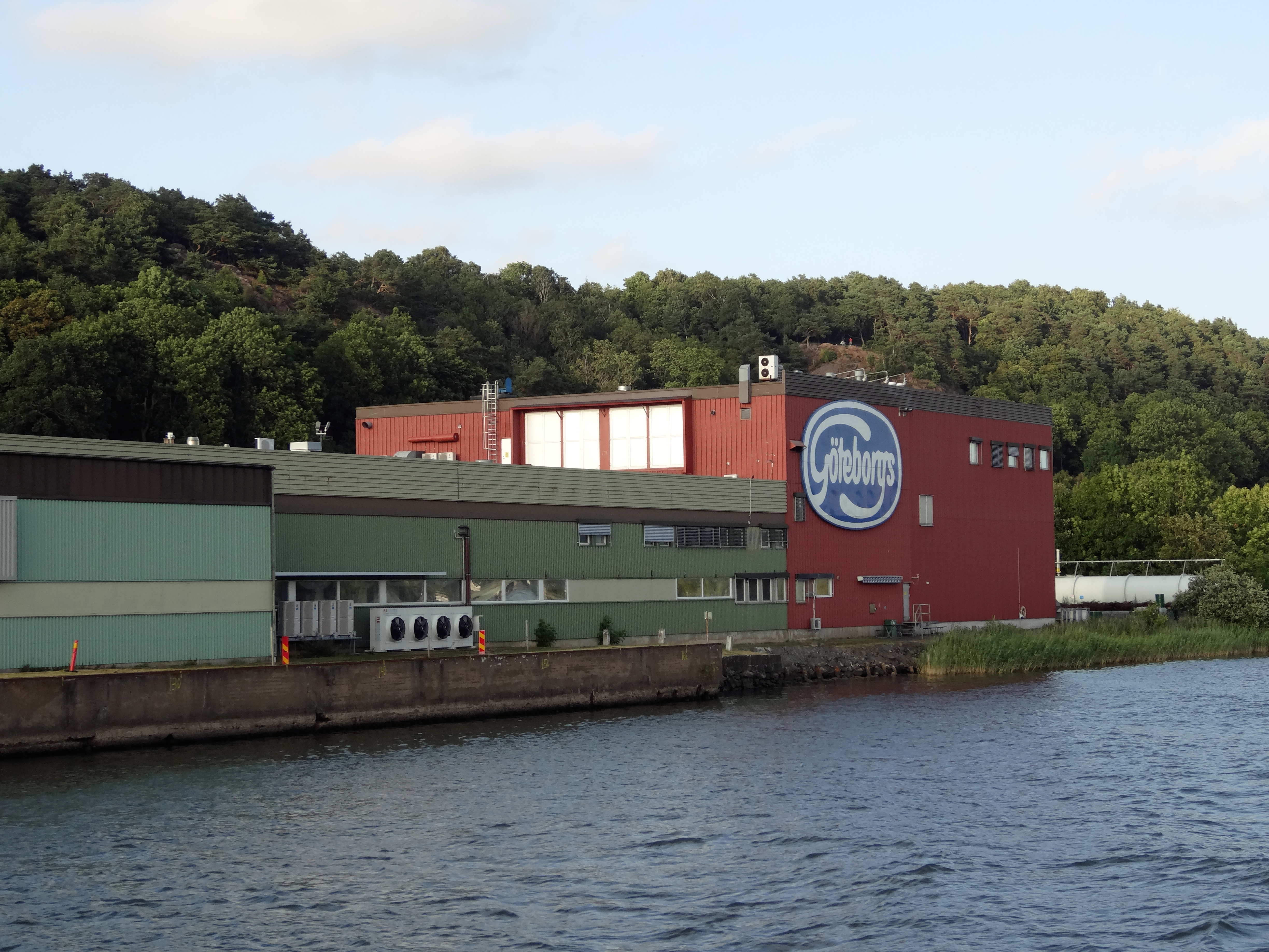 Göteborgs Kex anläggning i Kungälv.